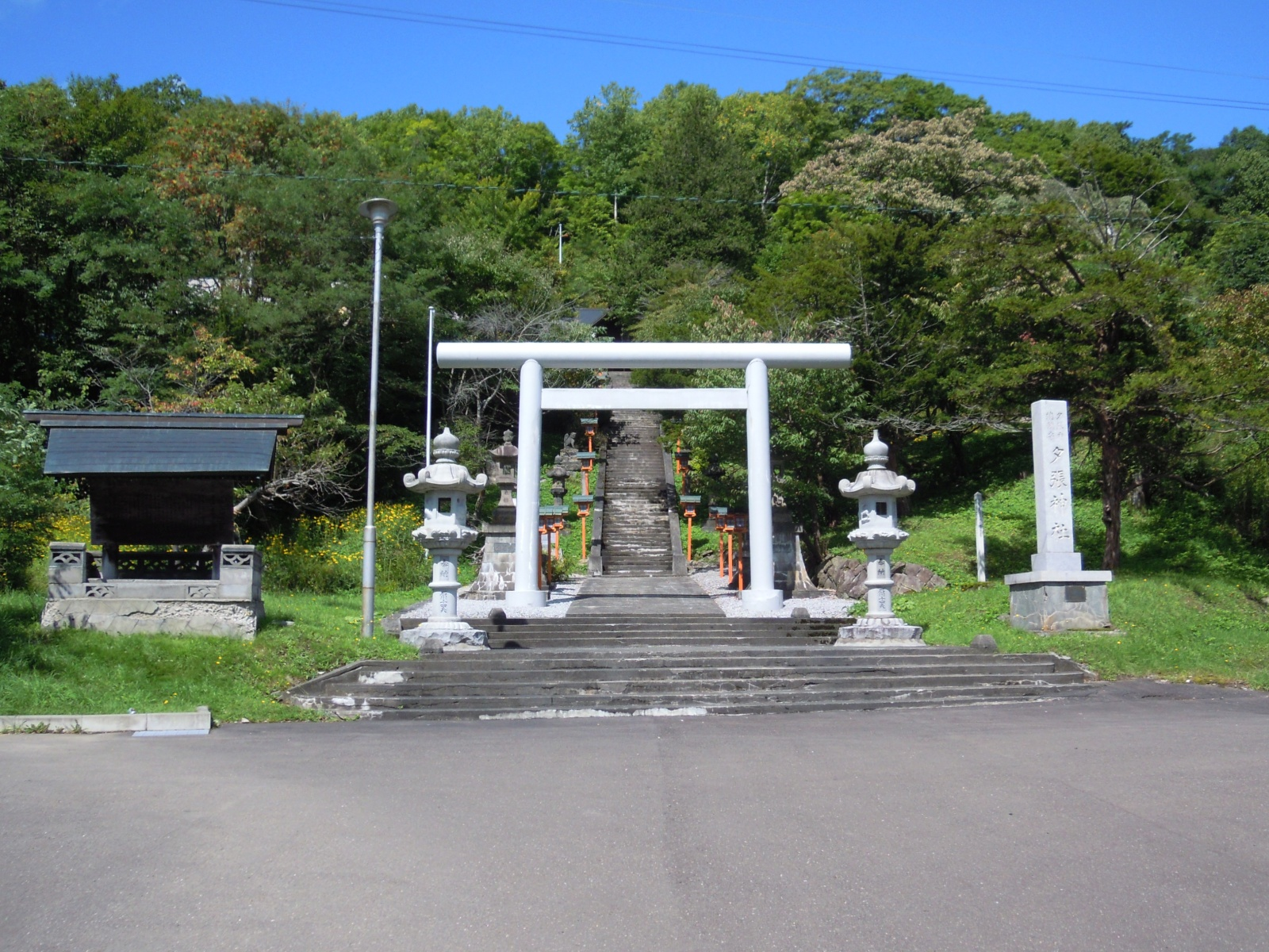 北海道夕張市にある夕張神社鳥居